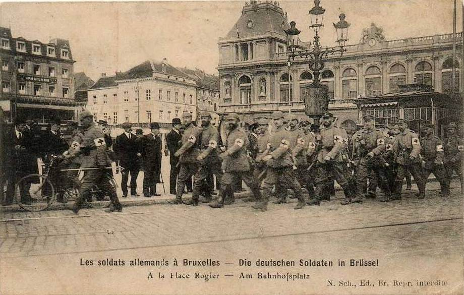 Passage de soldats allemands des services médicaux, porteurs du brassard Croix-Rouge. Place Rogier à Bruxelles durant la première guerre.